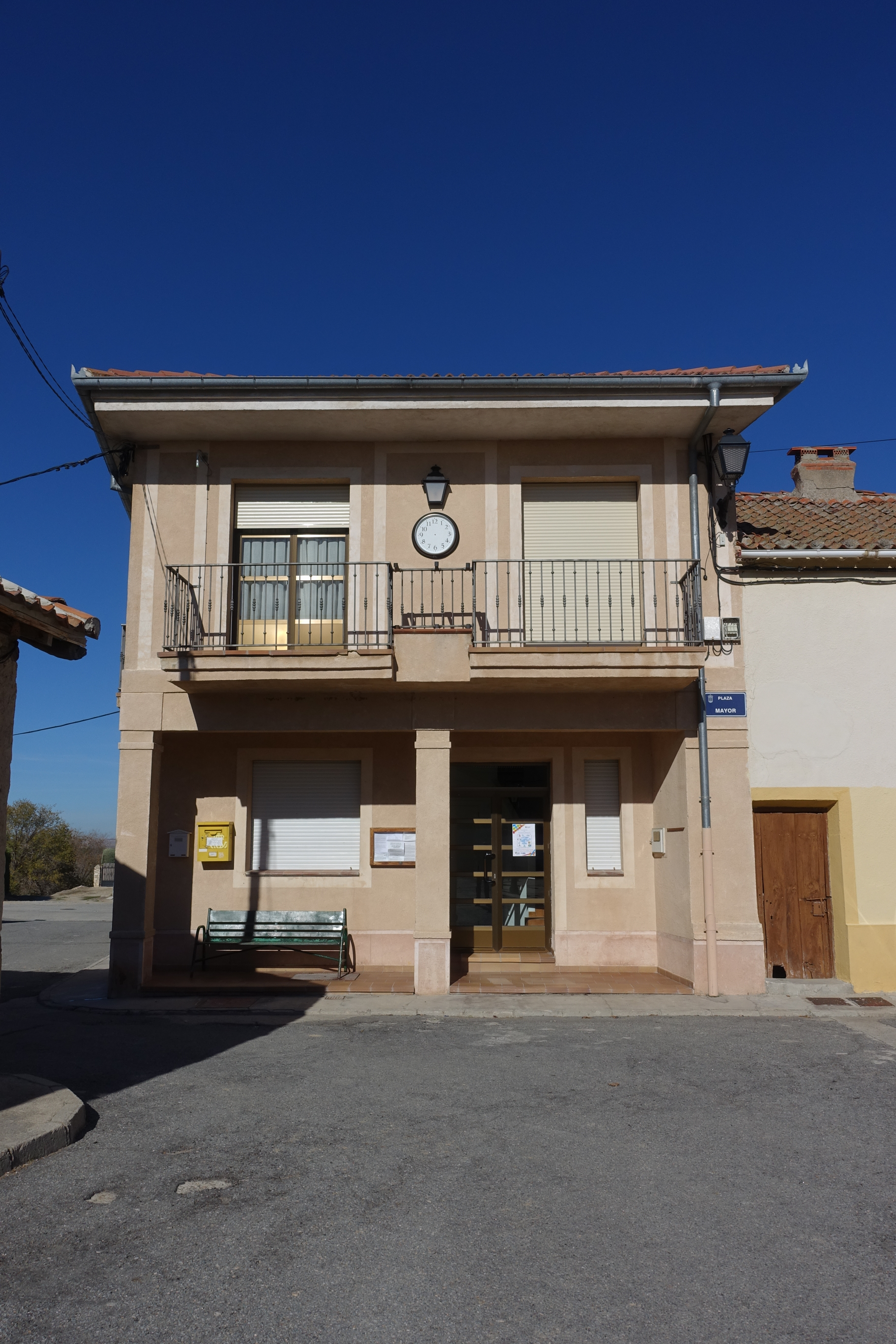 Casa consistorial de Juarros de Riomoros (Segovia, España).